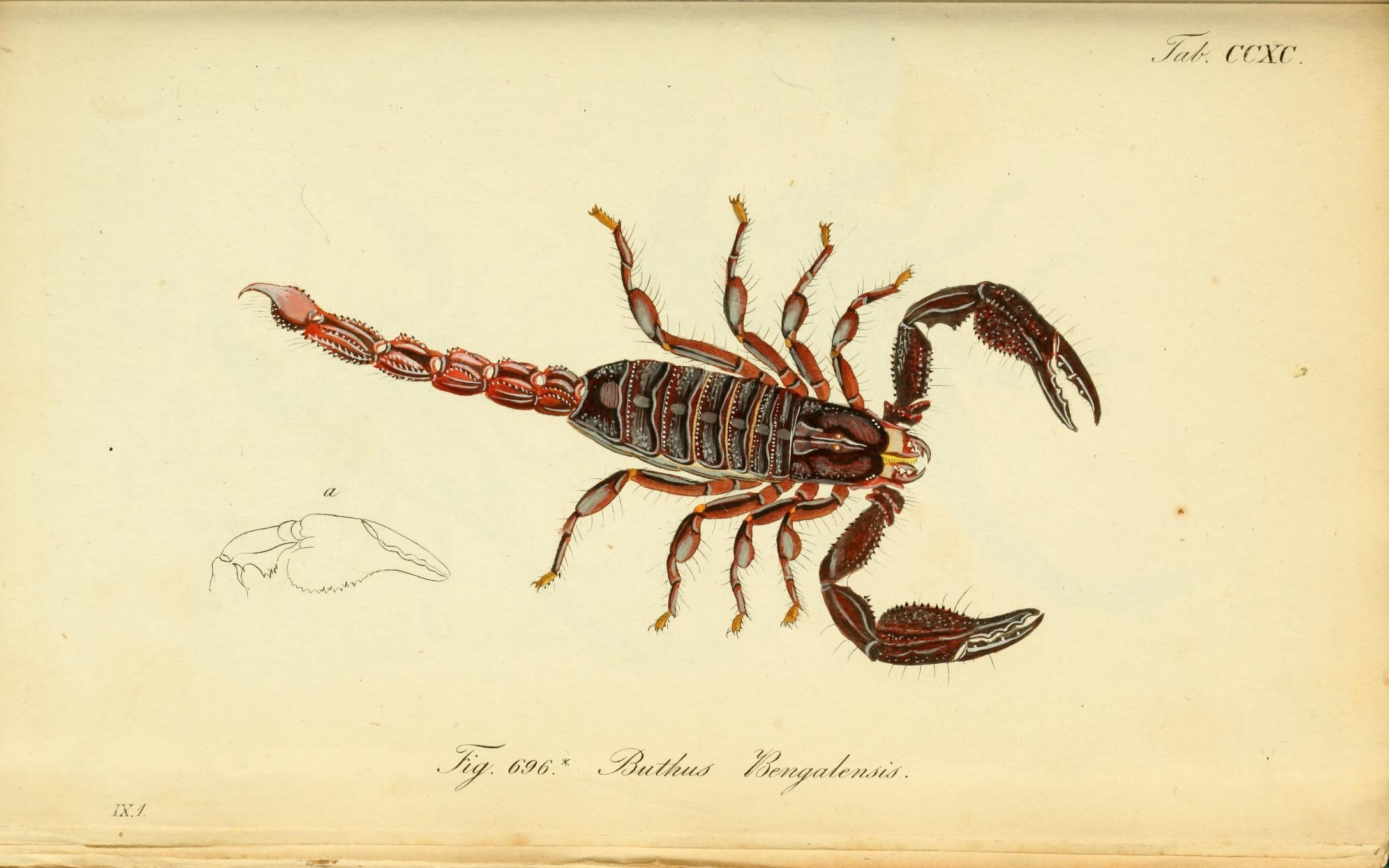 x •